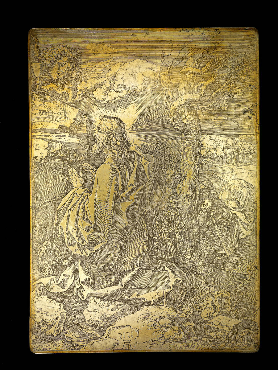 Druckplatte zur Eisenradierung „Christus am Ölberg“ von Albrecht Dürer (Staatsbibliothek Bamberg, Kuperplatte 25)